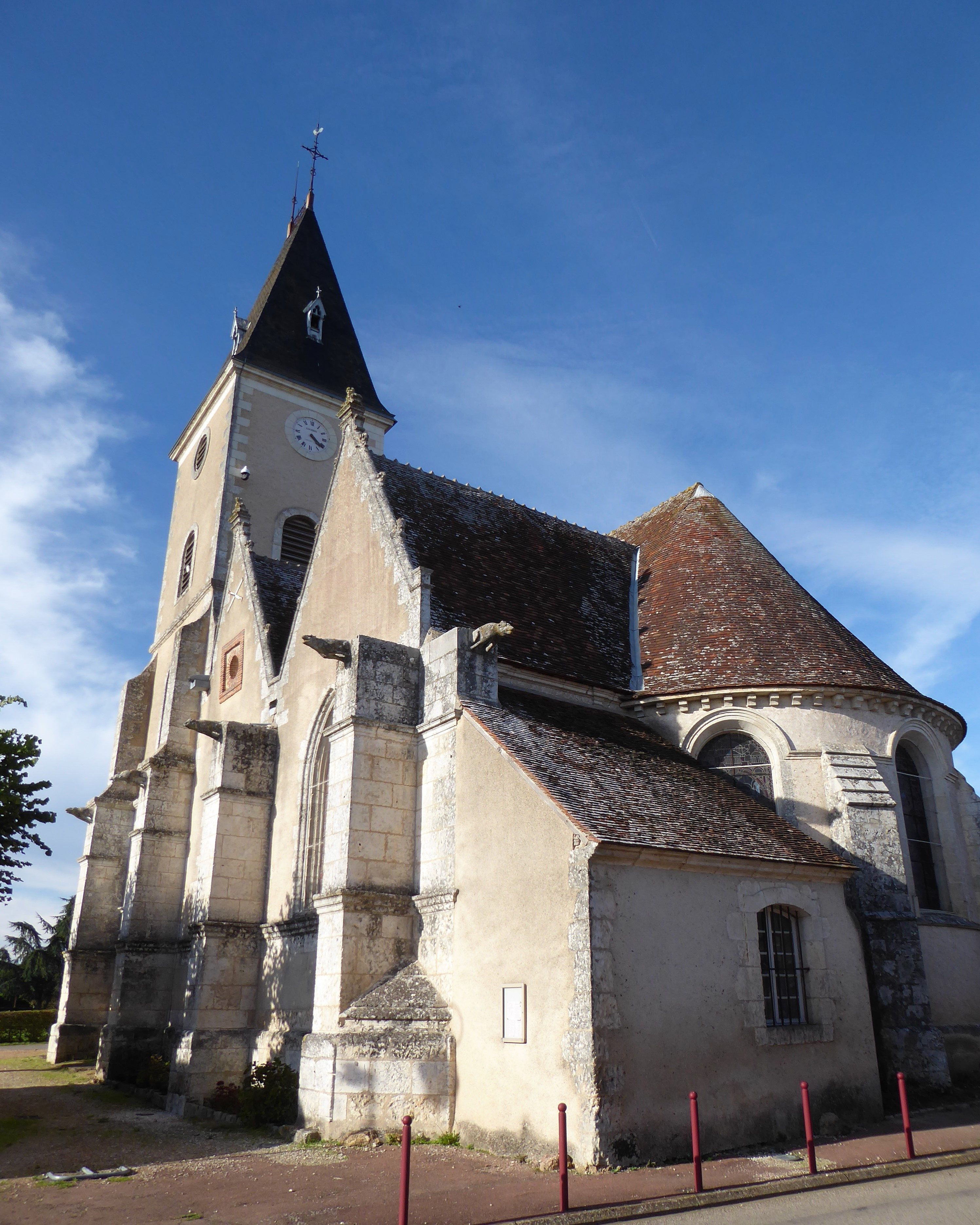 abside et gargouilles de l'église Saint-Pierre de Lanneray, Eure-et-Loir, France.